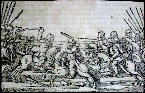 Bitva na Moravském poli